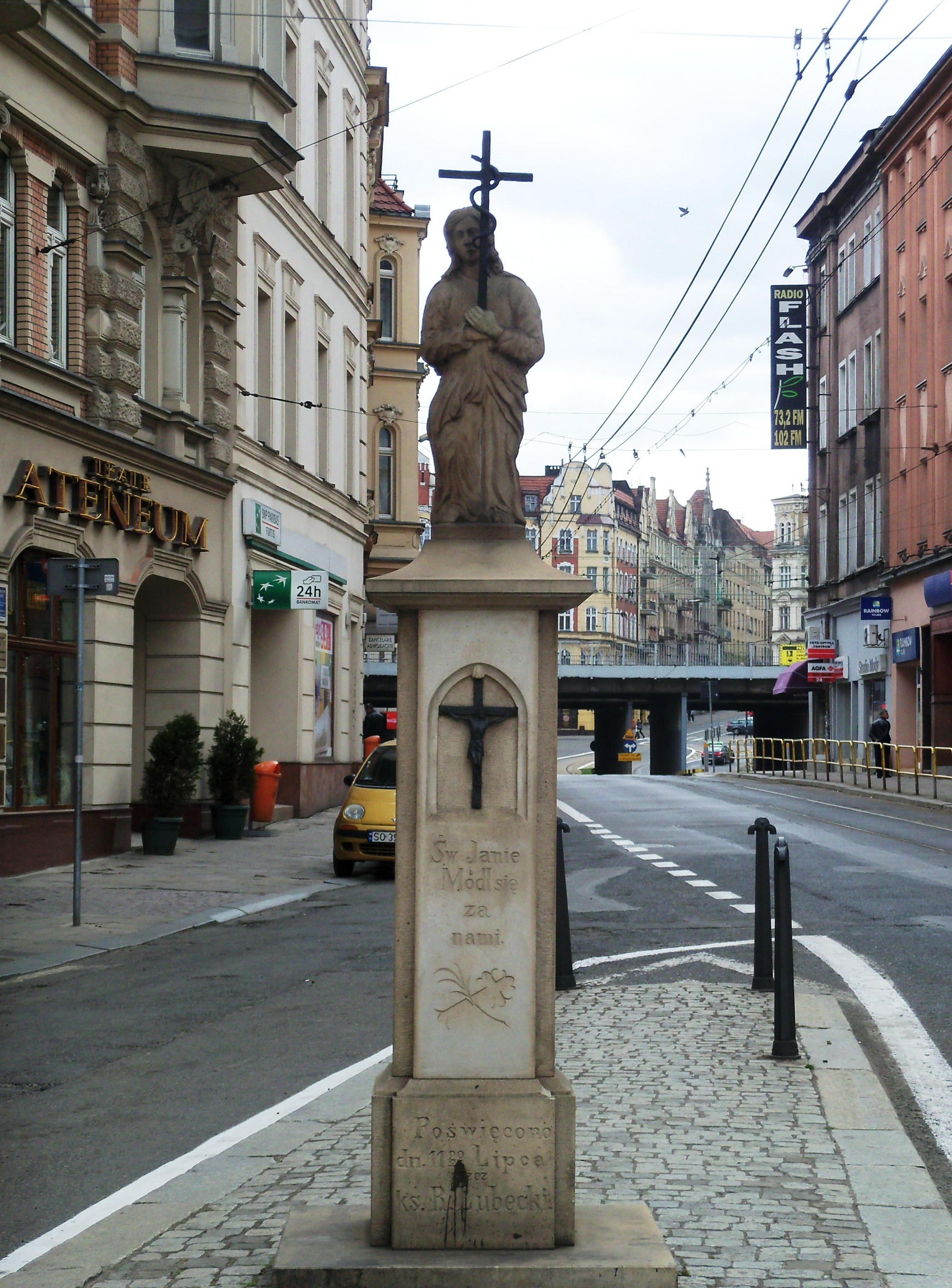 Katowice - figura św. Jana na ulicy św. Jana